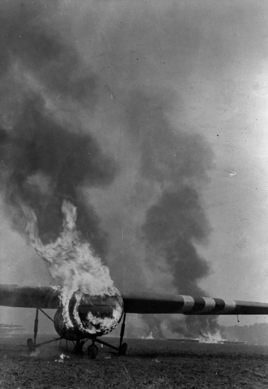 Arnheim, brennende britische Lastensegler Original Caption: "Die Hölle von Arnheim Schon bei ihrer Landung mit Lastenseglern und Fallschirmen erlitt die 1. britische Luftlandedivision im Raum von Arnheim durch die erbitterte deutsche Gegenwirkung schwerste Verluste. Zahlreiche Lastensegler wurden bereits in der Luft abgeschossen oder bei ihrer Landung in Brand gesetzt. Die Besatzungen kamen entweder ums Leben oder wanderten in deutsche Gefangenschaft. Wie Riesenfackeln brennen hier auf einem Landungsplatz viele britische Lastensegler aus. PK-Aufnahme, Kriegsberichter Rieder (Scherl Bilderdienst), 11.10.44 [Herausgabedatum]" ADN-Bildarchiv, II. Weltkrieg 1939-45, Schlacht um Arnheim (Holland) vom 17.-27.9.1944 Die am 17.9.1944 begonnene alliierte Luftlandeoperation bei Arnheim sollte die Übergänge Rhein, Maas und Waal sichern. Nach großen Verlusten wurden die gelandeten Truppen Ende September zurückgezogen. Einer der Lastensegler der britischen 1. Fallschirmjägerdivision, der schon während der Landung bei Arnheim in Brand geschossen wurde. Aufnahme: Rieder Information added by Wikimedia users. Ein brennender britischer Airspeed Horsa Lastensegler in den Niederlanden während der Operation Market Garden im September 1944.